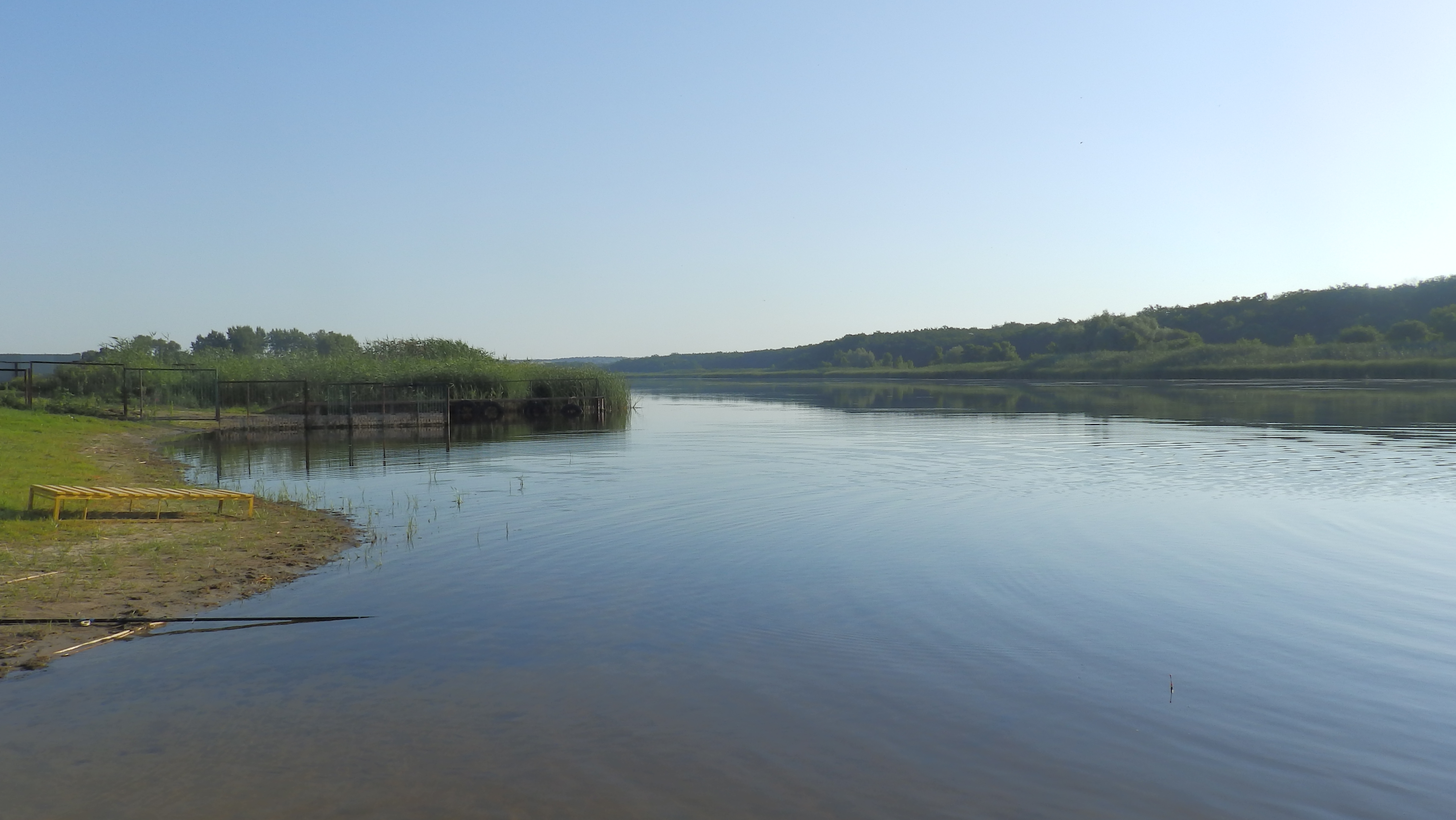 Утро на Ориле